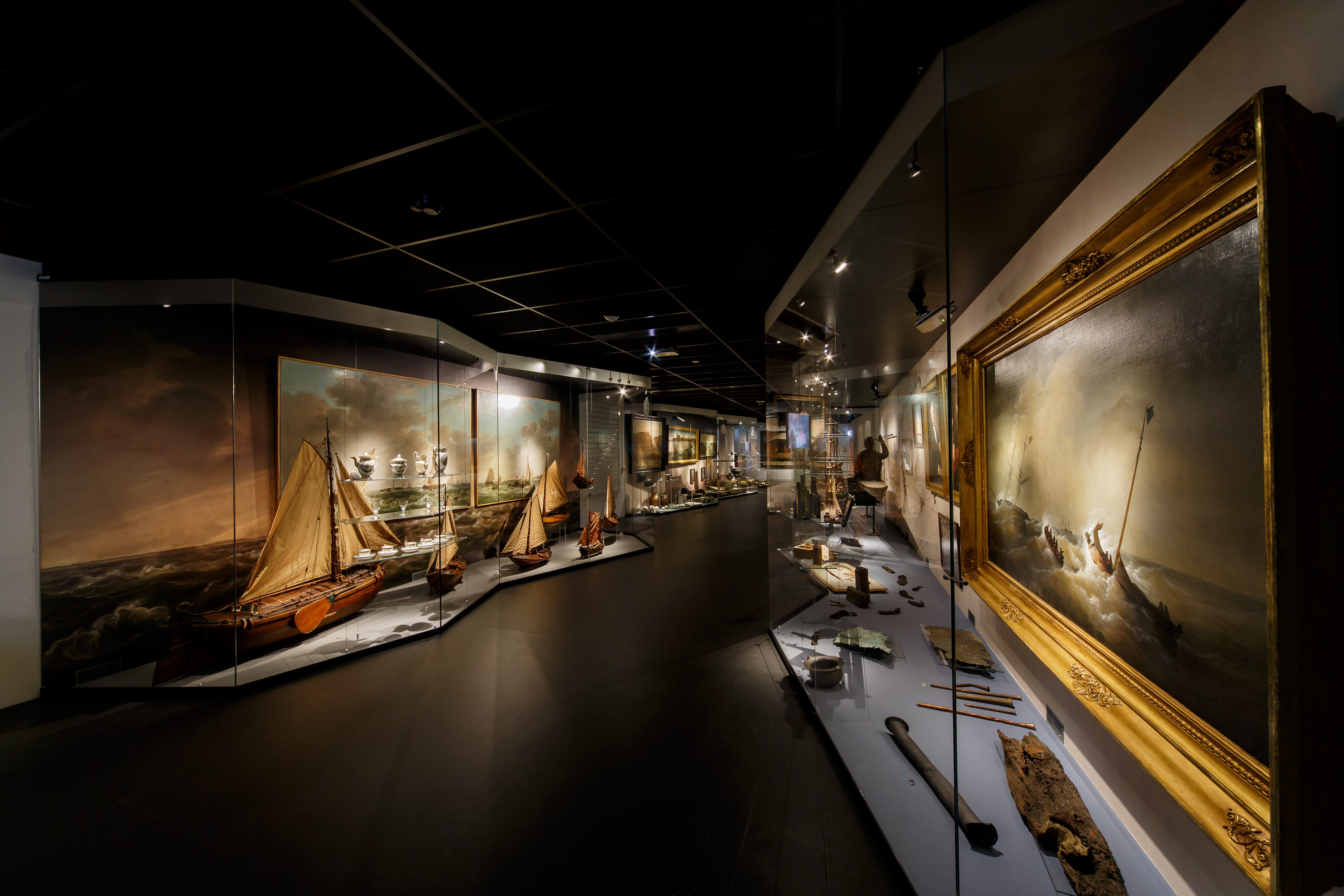 De tentoonstellingszaal van het Stadhuismuseum Zierikzee